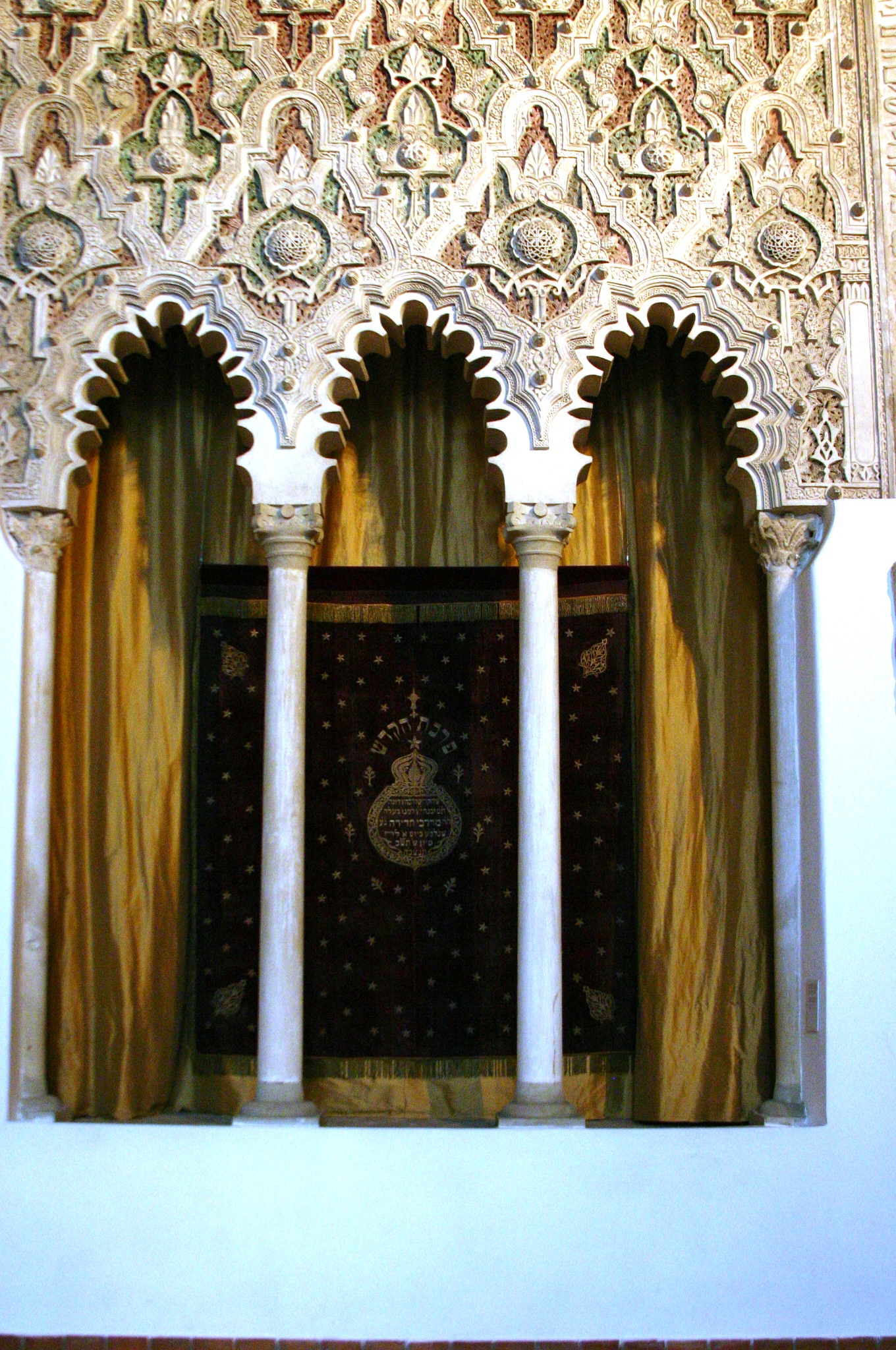 Nicho da Torá